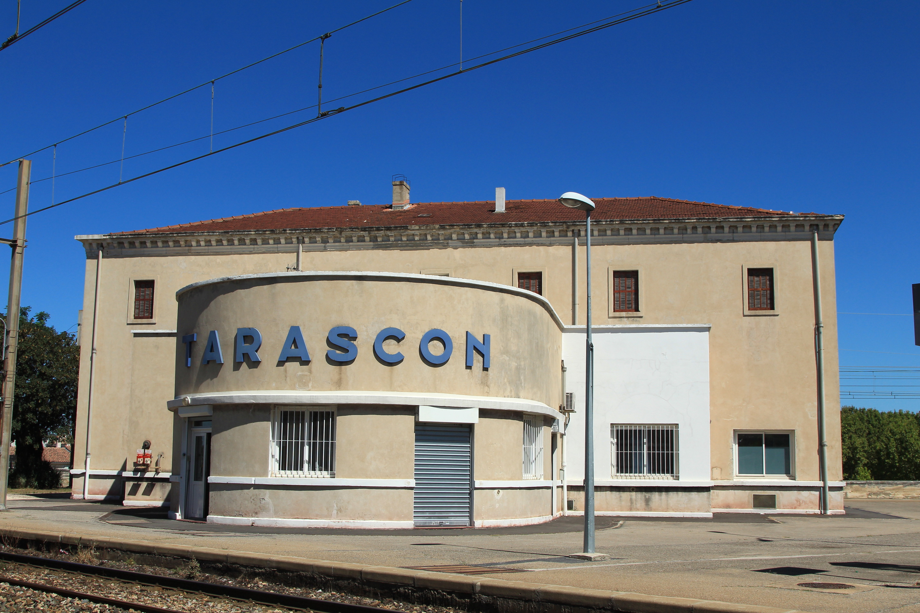 Bâtiment voyageurs et technique de la gare de Tarascon.